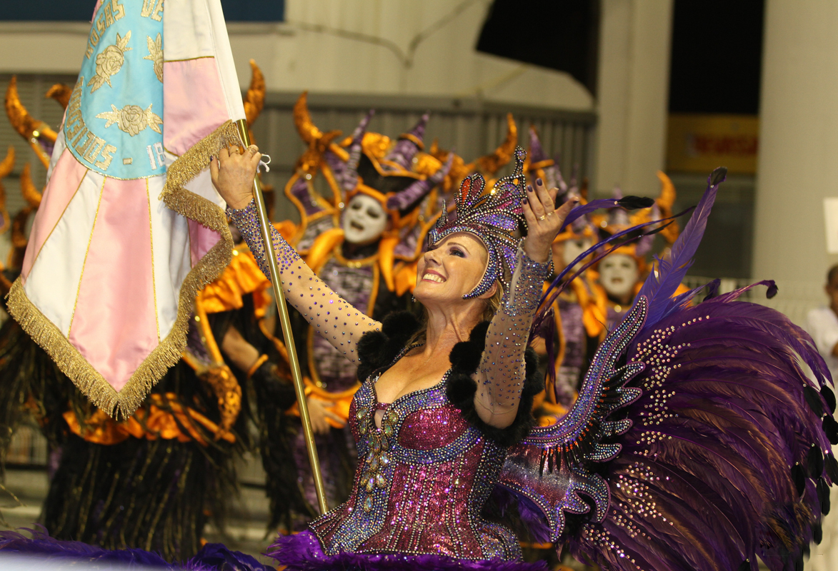 Desfile das Escolas de Samba de SP - Grupo Especial - 2015